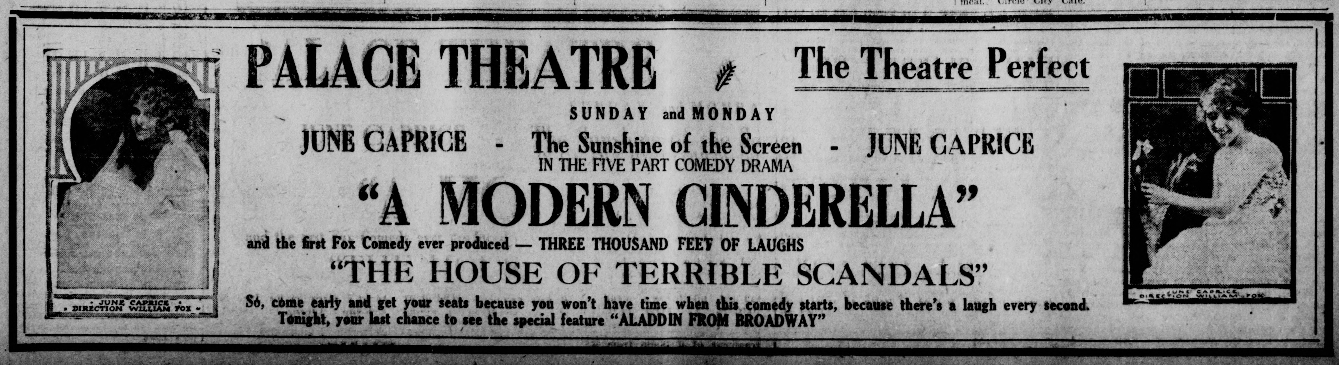 A Modern Cinderella advertisement